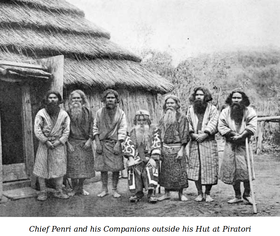 A sea-girt yezo par le Révérend John Batchelor, 1902 ː le chef Perri et ses compagnons devant sa case.